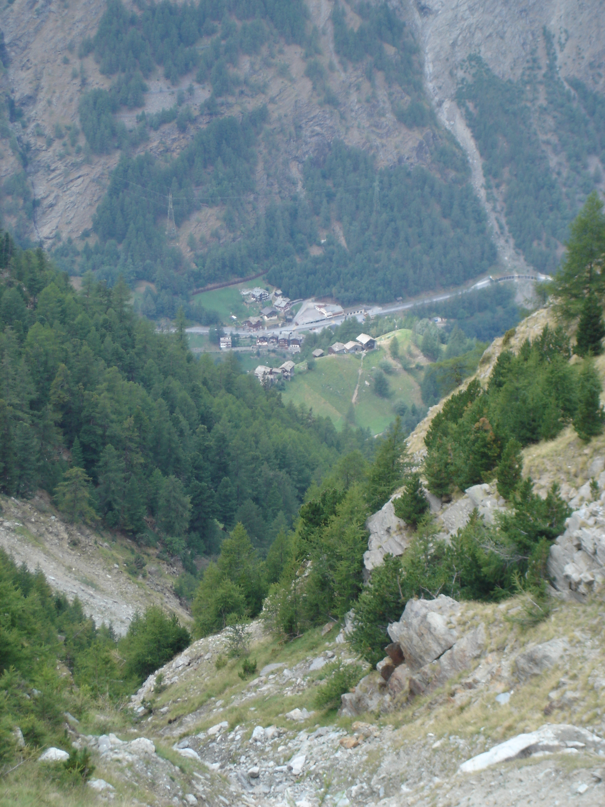 Eisten im Wallis